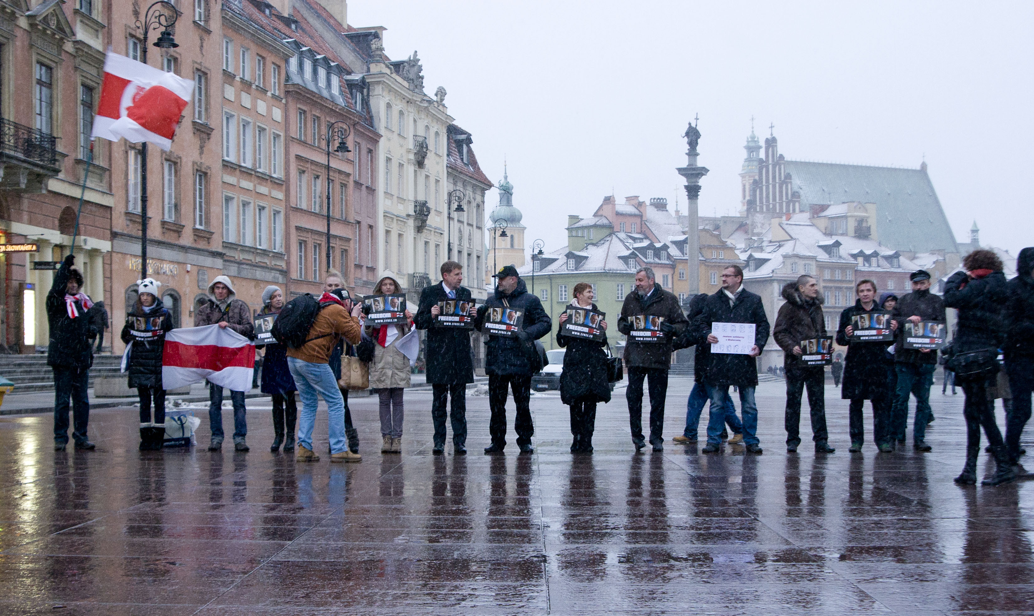 Belarusian demonstration in Warsaw